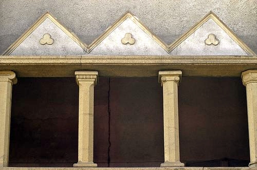 Säulengang im Schlachthof Bad Kissingen